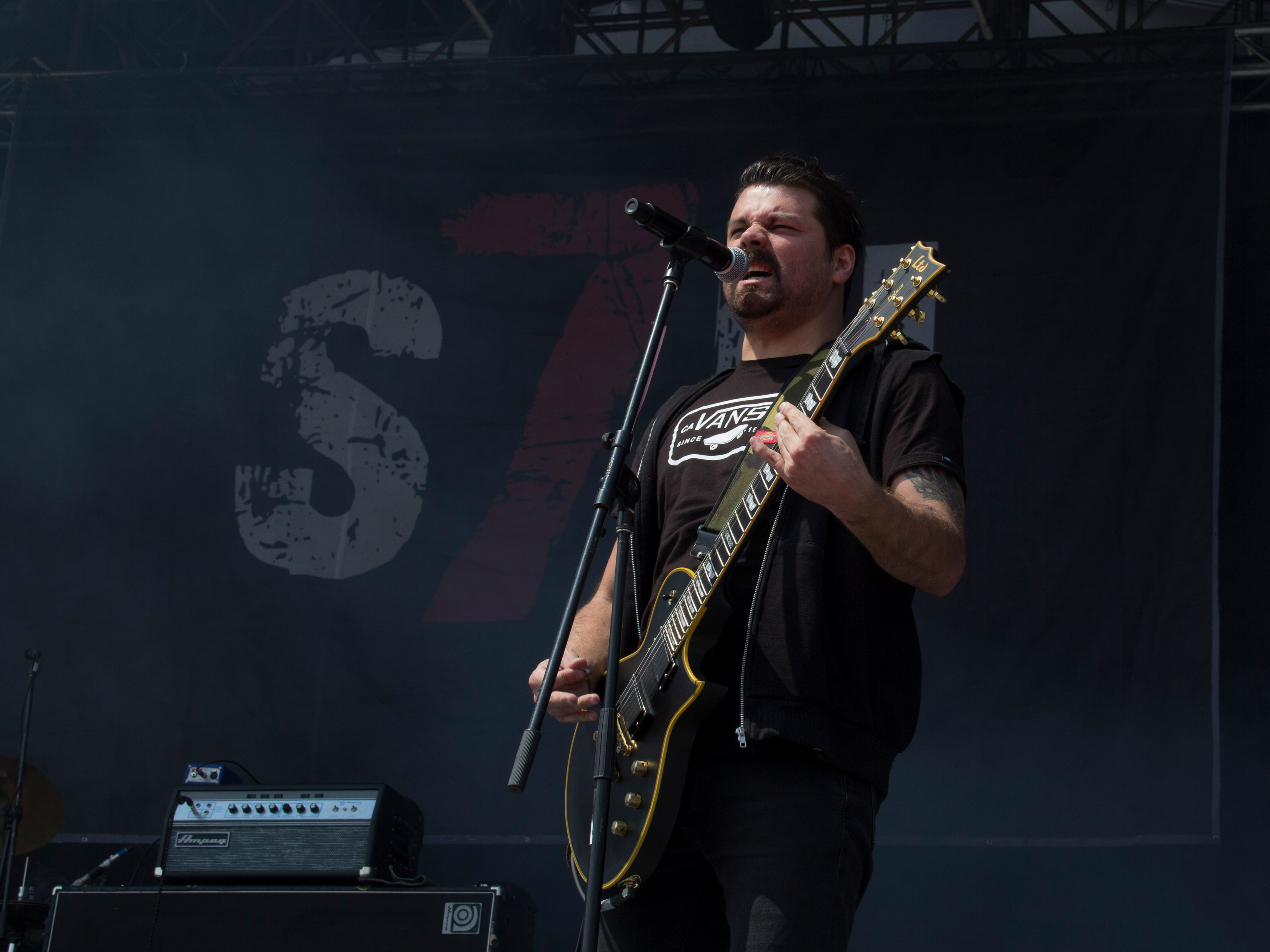 PRESENTACIÓN DE S7N EN EL KNOTFEST MÉXICO 2017 GUITARRISTA ISRAEL MONROY